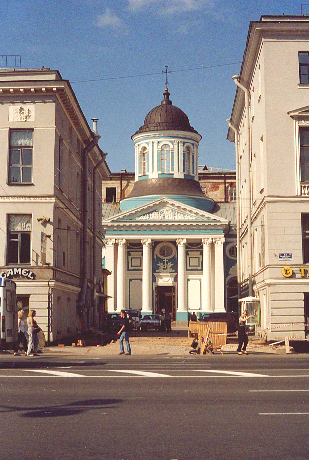 Фельтен Юрий Матвеевич (1730-1801) Армянская церковь на Невском проспекте